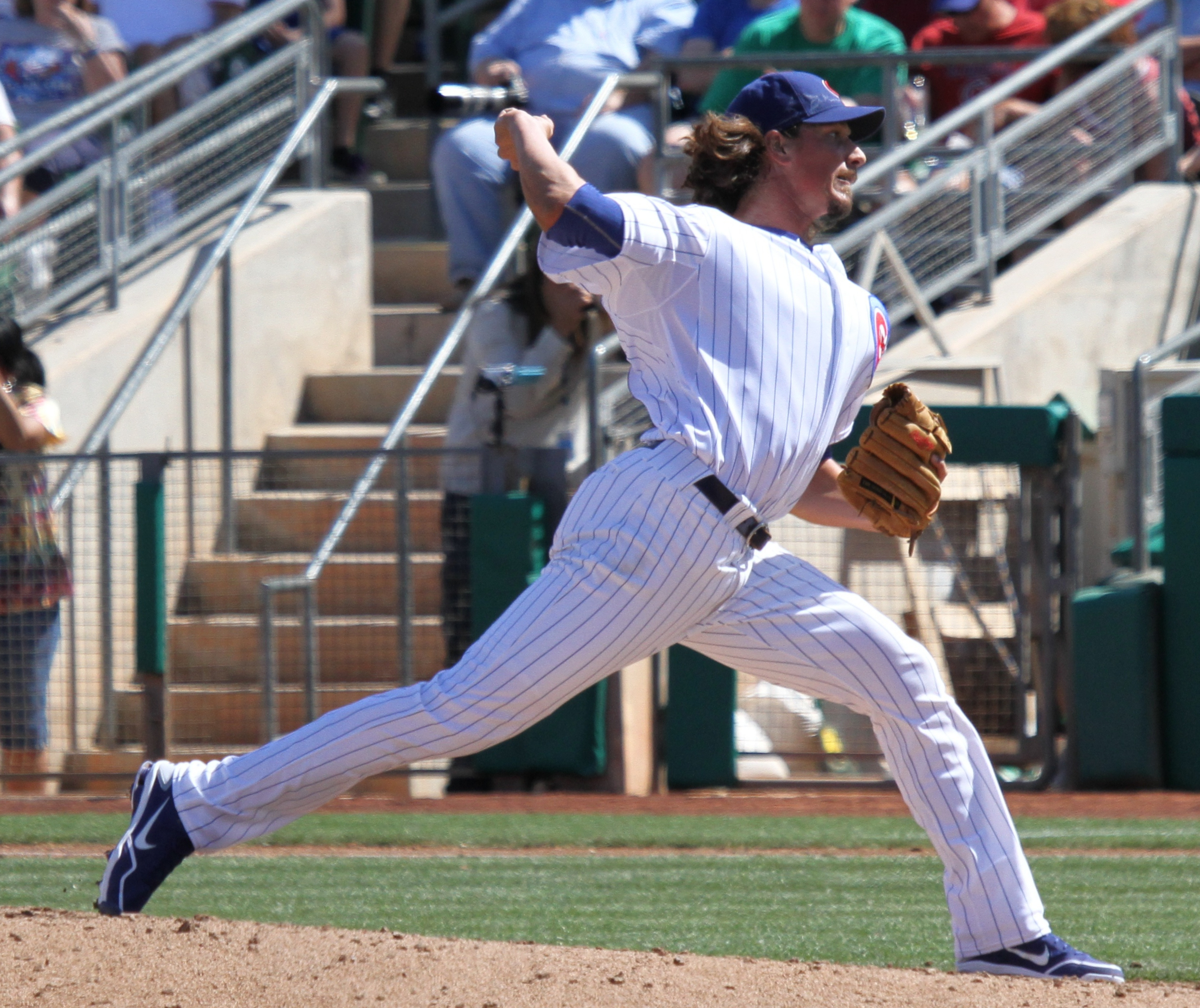 Jeff Samardzija